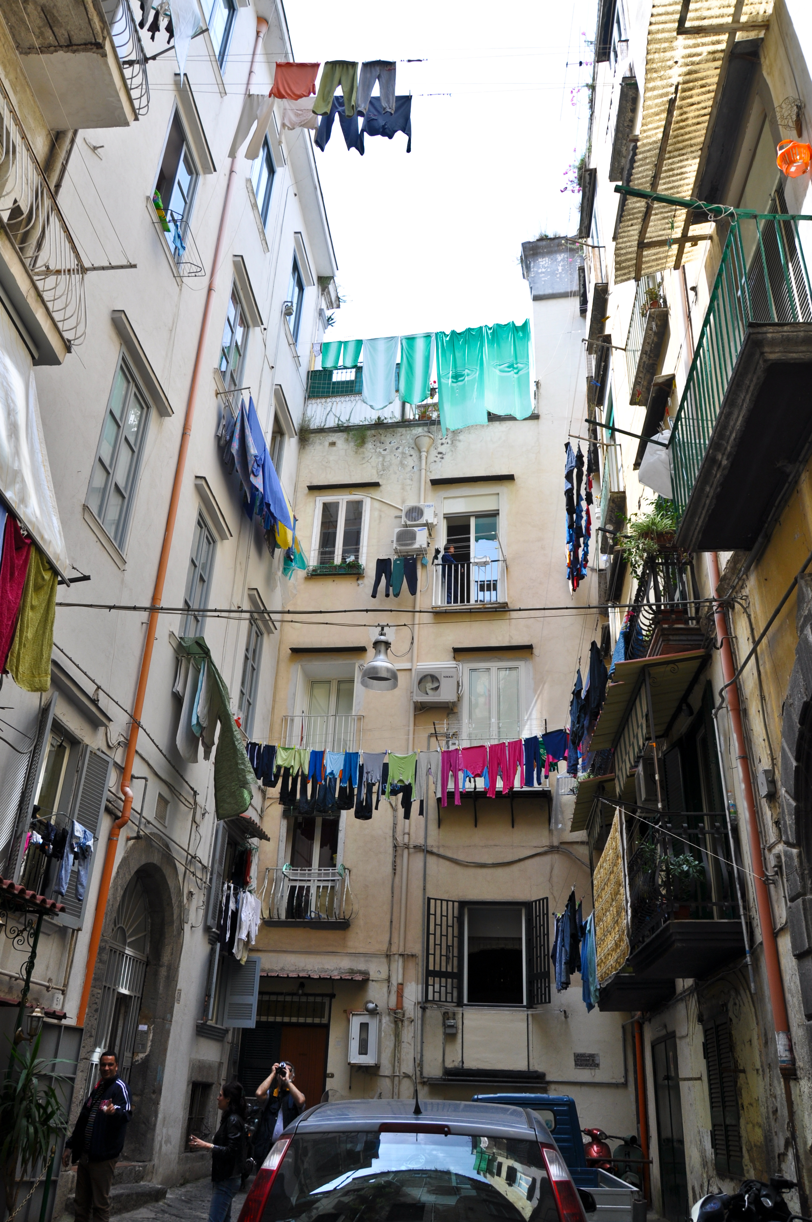 ...l'uscita in un cortile tra i palazzi dell'Anticaglia...